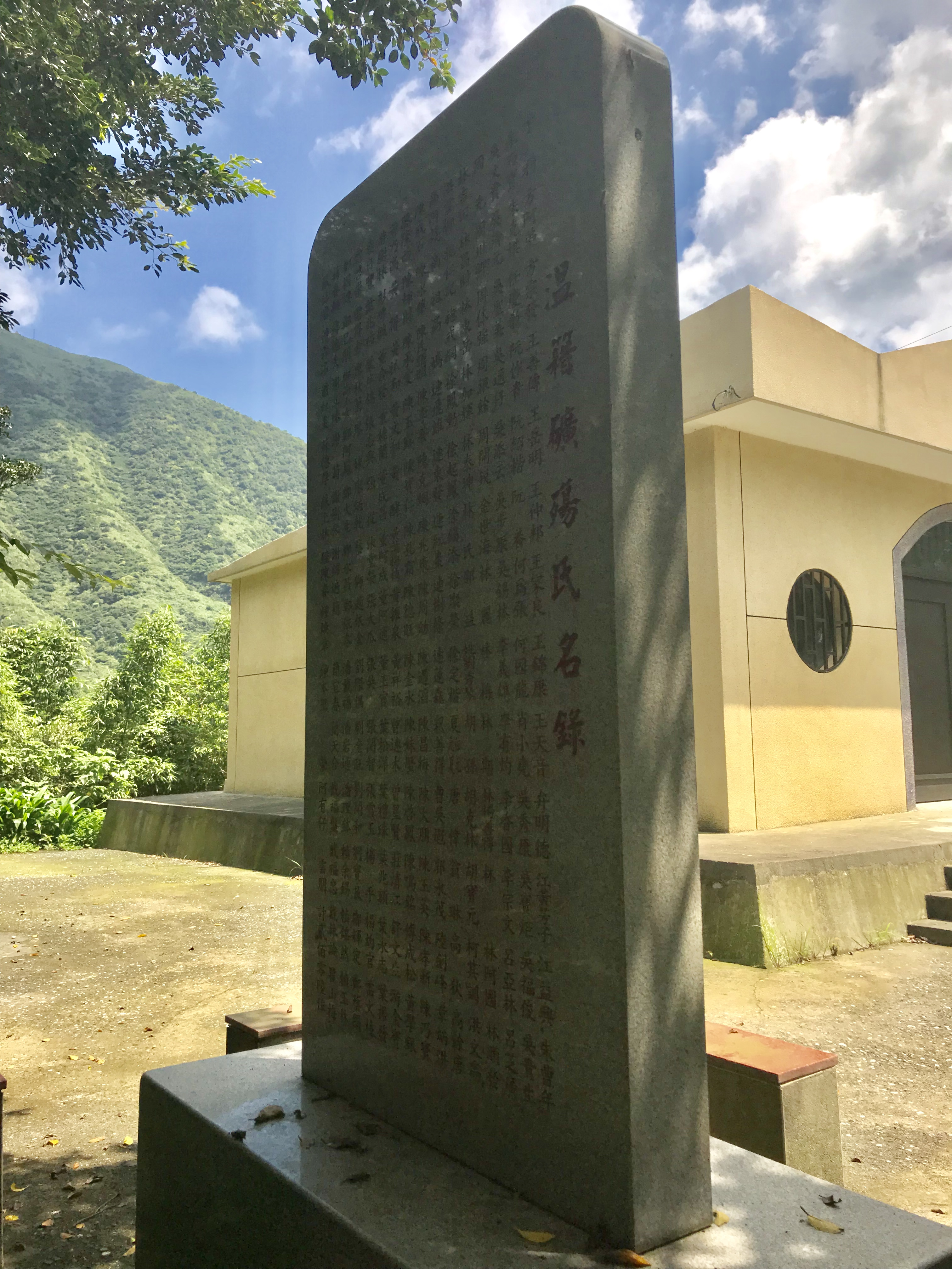 金瓜石礦山溫籍礦殤祭祀碑背面人名